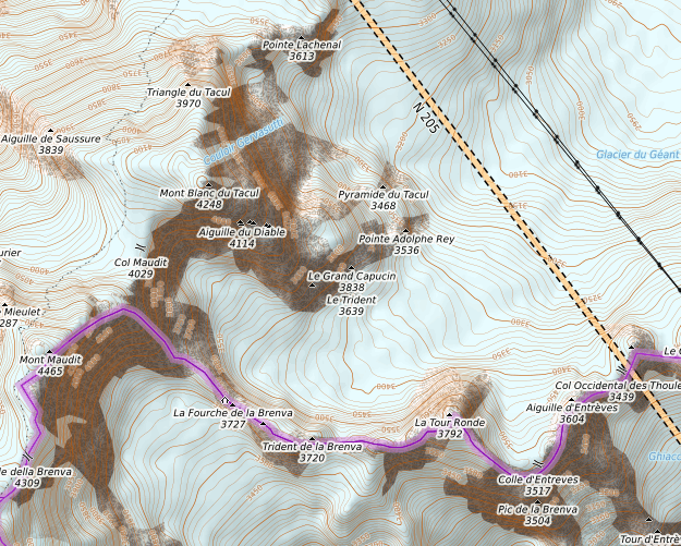 carte réalisée sur umap This map may be incomplete, and may contain errors. Don't rely solely on it for navigation.